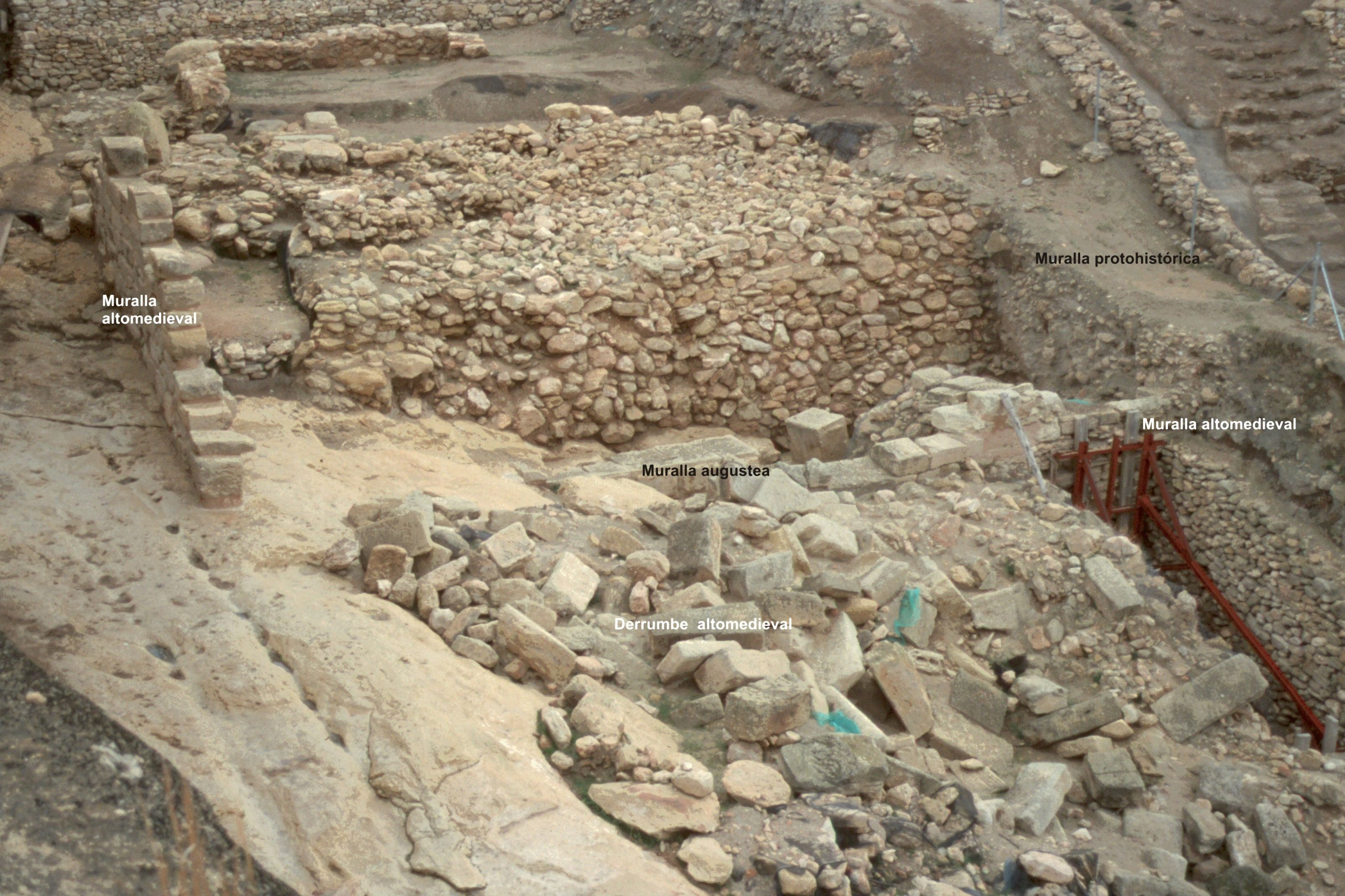 Estructuras defensivas del Reguerón, Tolmo de Minateda